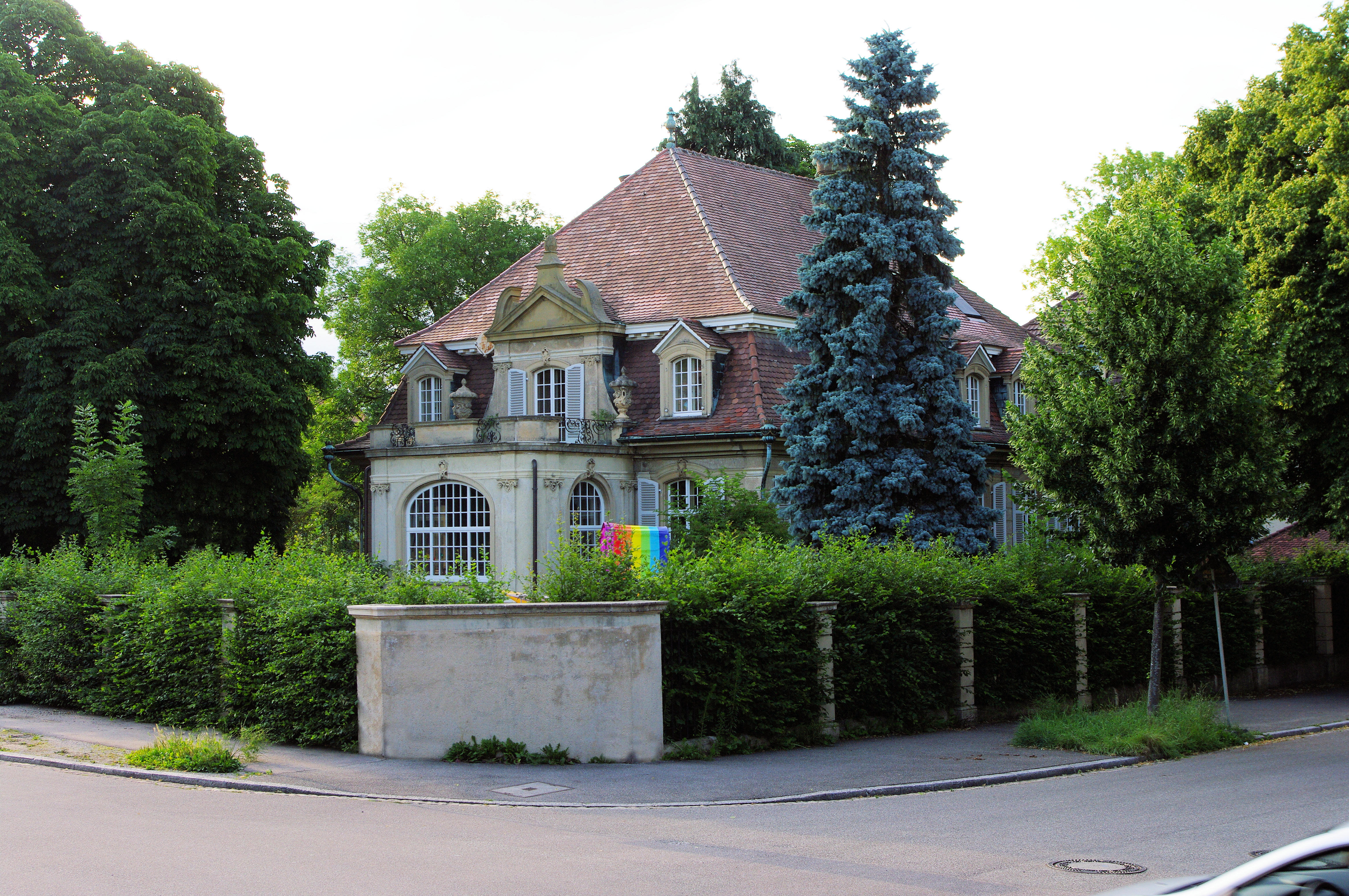 Haus der Familie Knopf. Heute ist es ein Montessori-Kindergarten und Schule